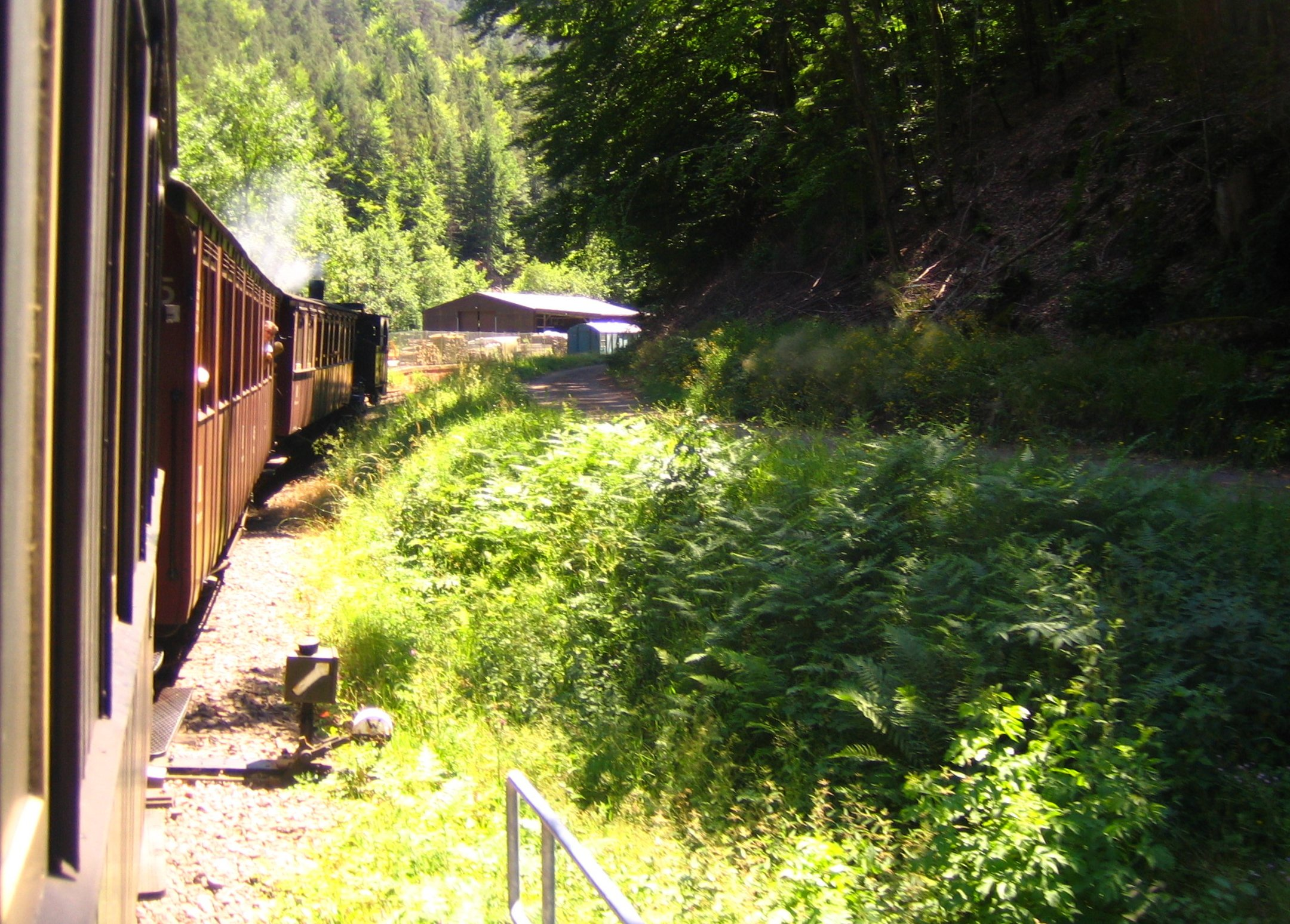 Kuckucksbähnel zwischen Elmstein und Helmbach, selbst fotografiert